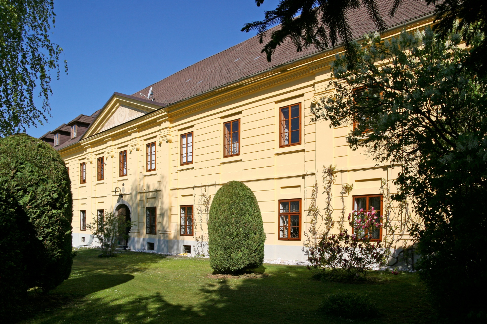 Neues Herrenhaus Blumau bei Kirchdorf, Schaufassade. Architekt: Franz Höbarth, 1831